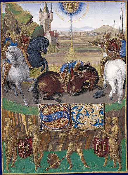 Représentation de la Bastille et de Paris au loin, à l'arrière plan.